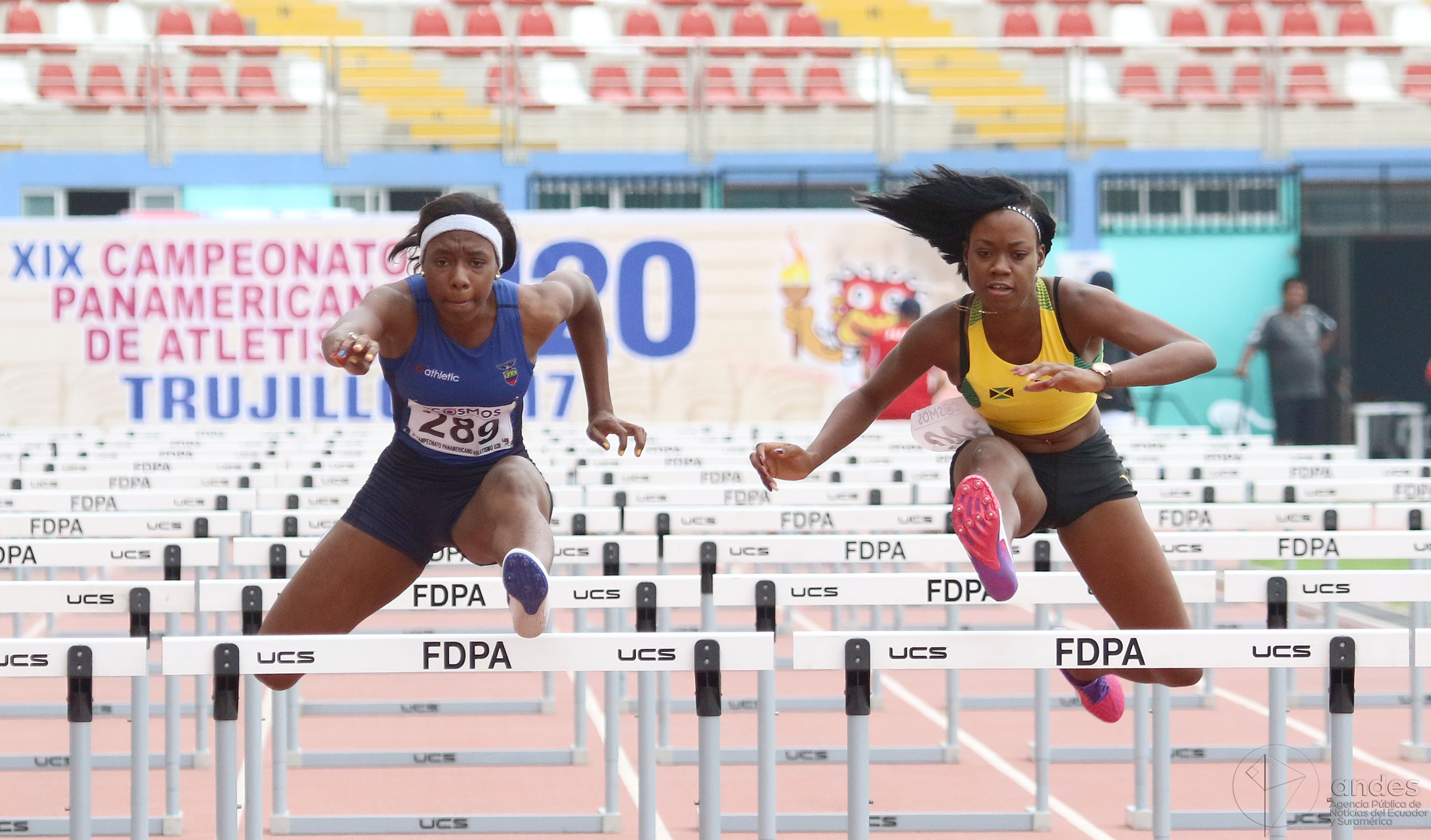 Trujillo, Perú, viernes 21 de julio del 2017 (Andes).-La ecuatoriana Maribel Caicedo participa en 100 metros vallas, en los XIX Panamericano de Atletismo Trujillo 2017. Foto:Andes/César Muñoz